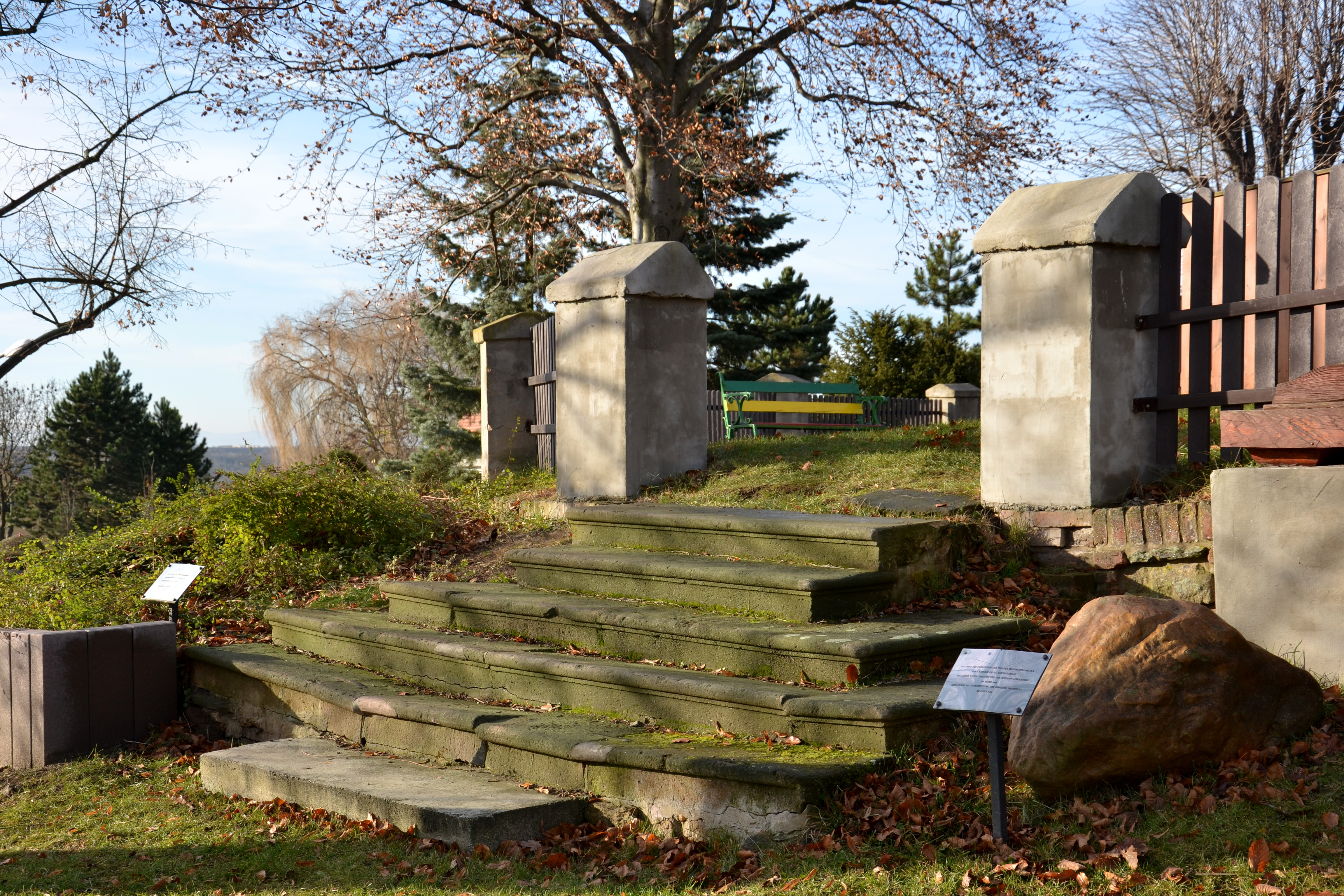 Hrušovany – schodiště na bývalý hřbitov